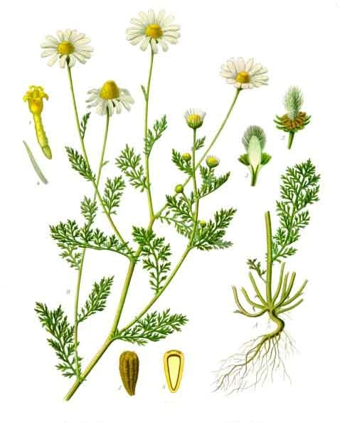 Stinkende Hundskamille. A Wurzel und unterer Teil der Pflanze. B blühender Zweig. 1 Scheibenblüte; 2 Blütenboden mit Spreublättchen; 3 Längsschnitt desselben; 4 Spreublättchen; 5 Frucht; 6 dieselbe im Längsschnitt.